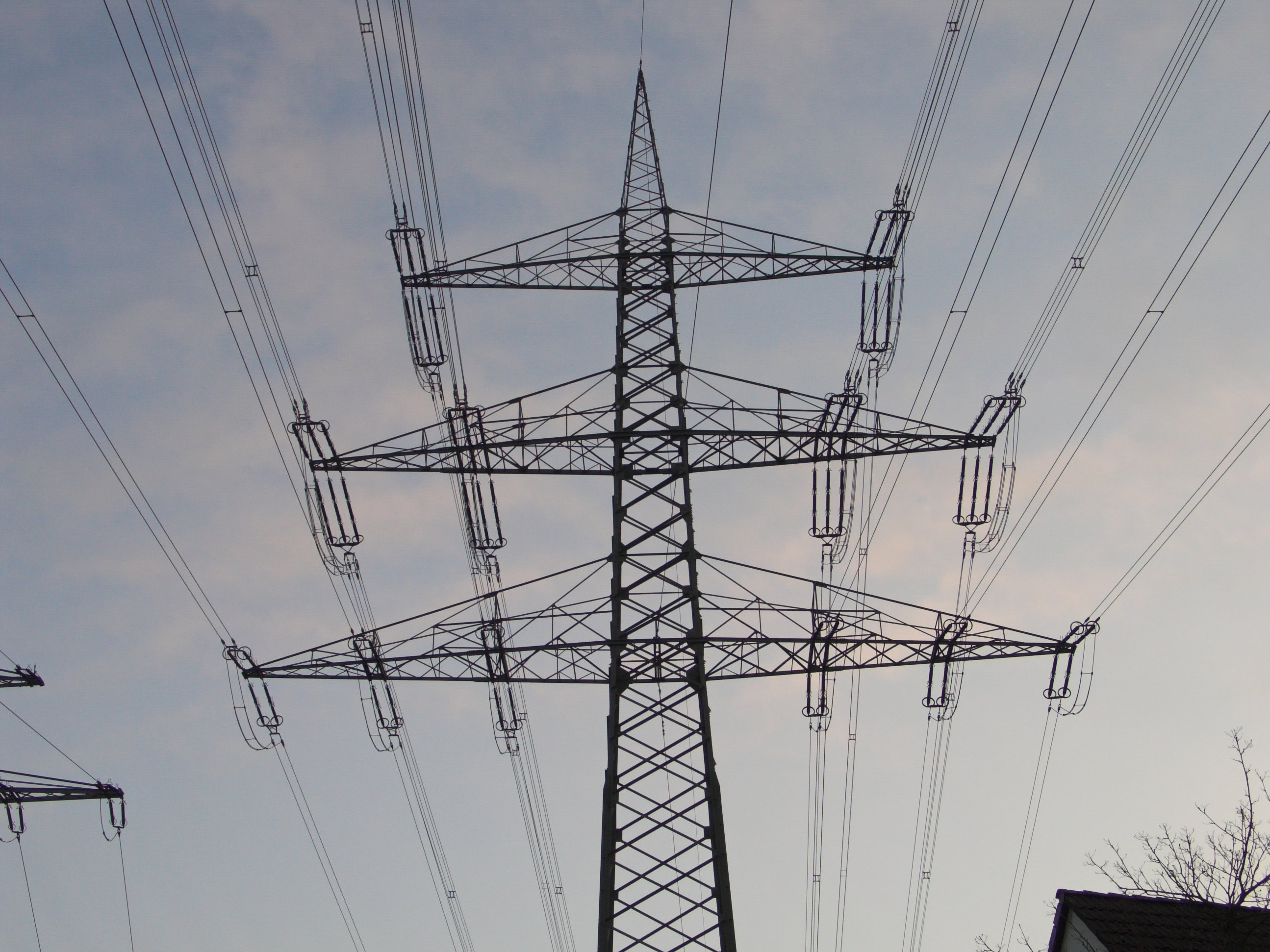 Hochspannungsmast mit je zwei 220-kV- und 380-kV-Systemen